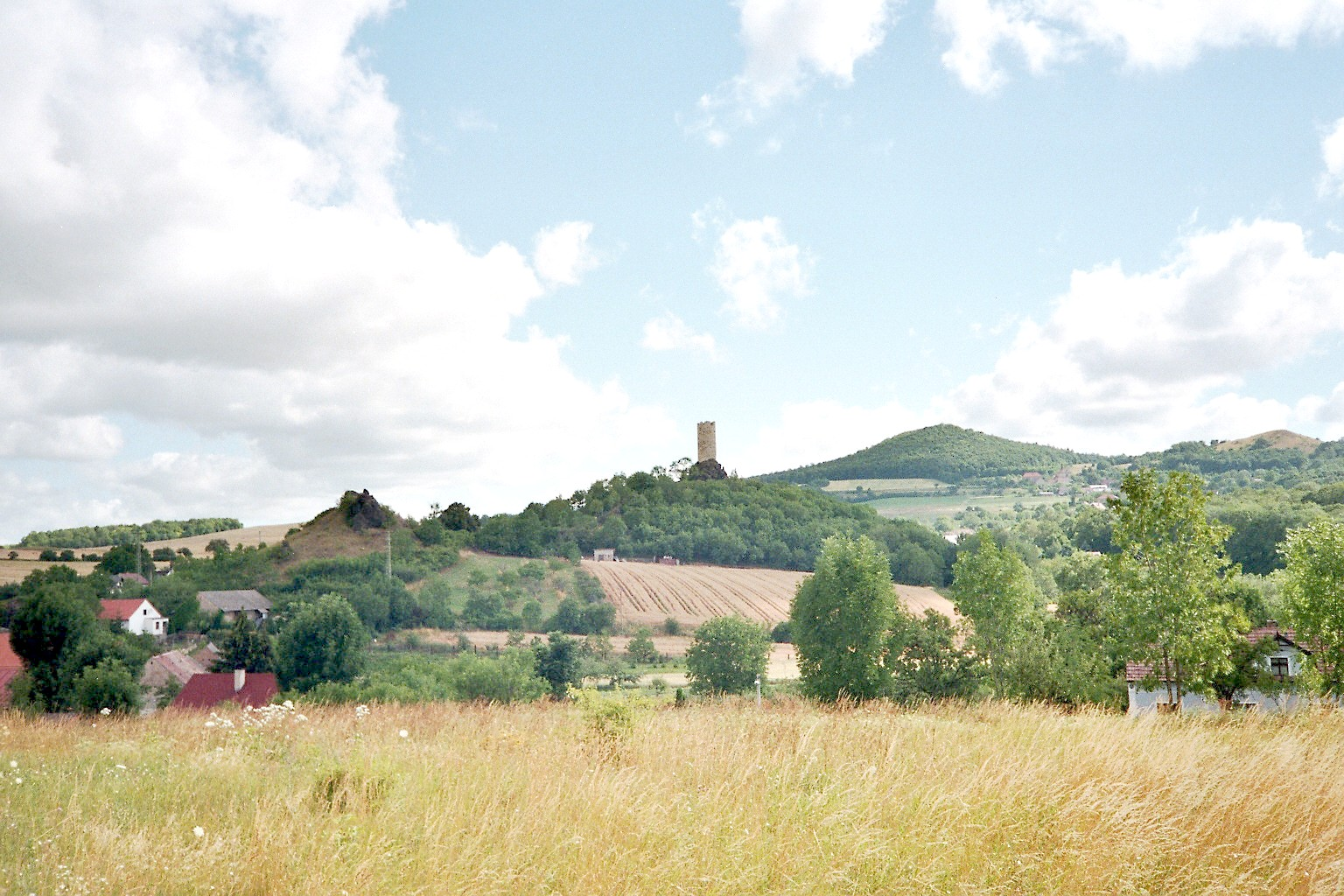 Hrad Skalka ve Vlastislavi, okres Litoměřice